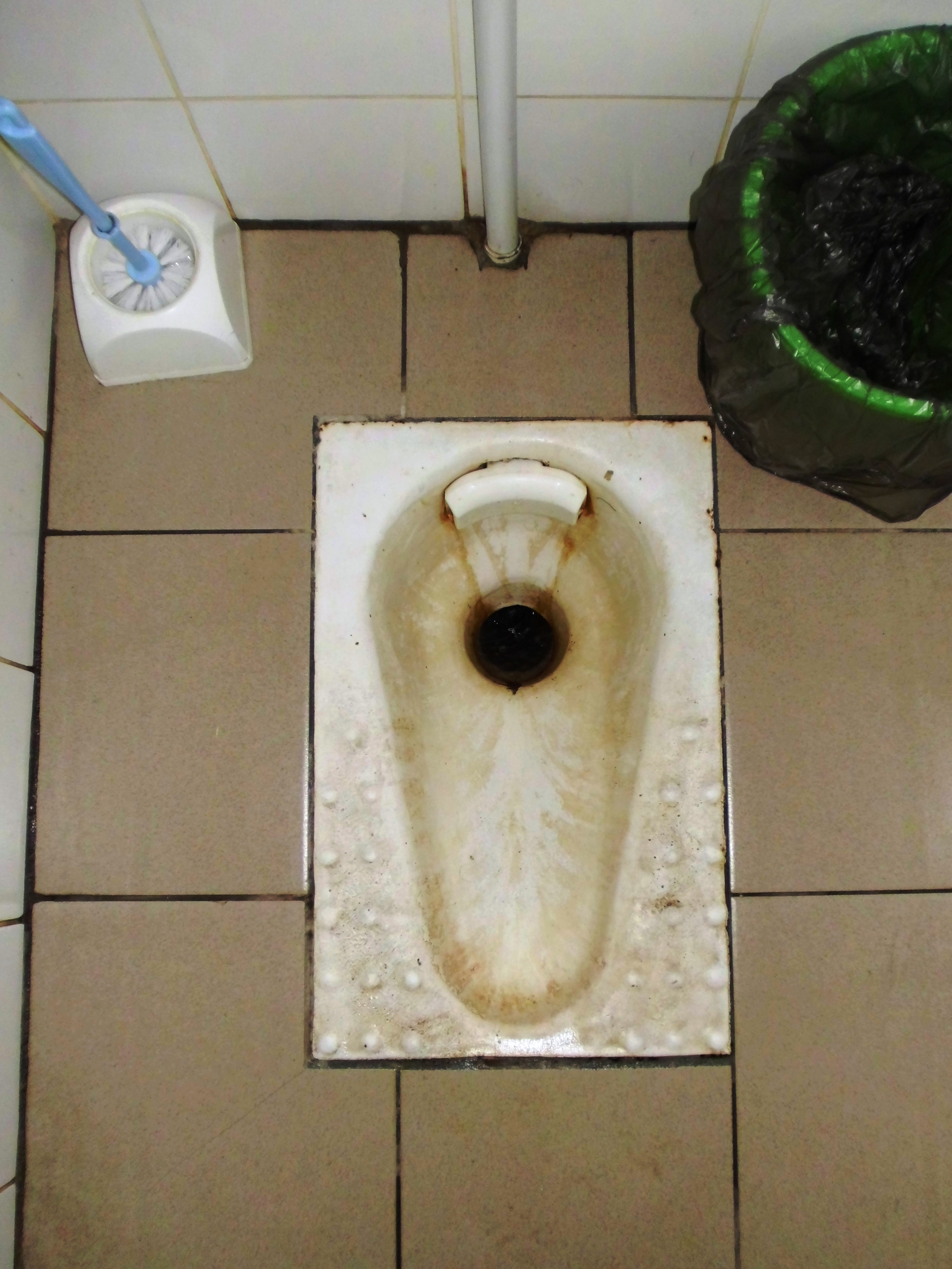 Стандартная чаша Генуя советского образца для общественных туалетов с большим потоком пользующихся. В данном случае установлены в туалете железнодорожного вокзала одной из ж/д станции в России.